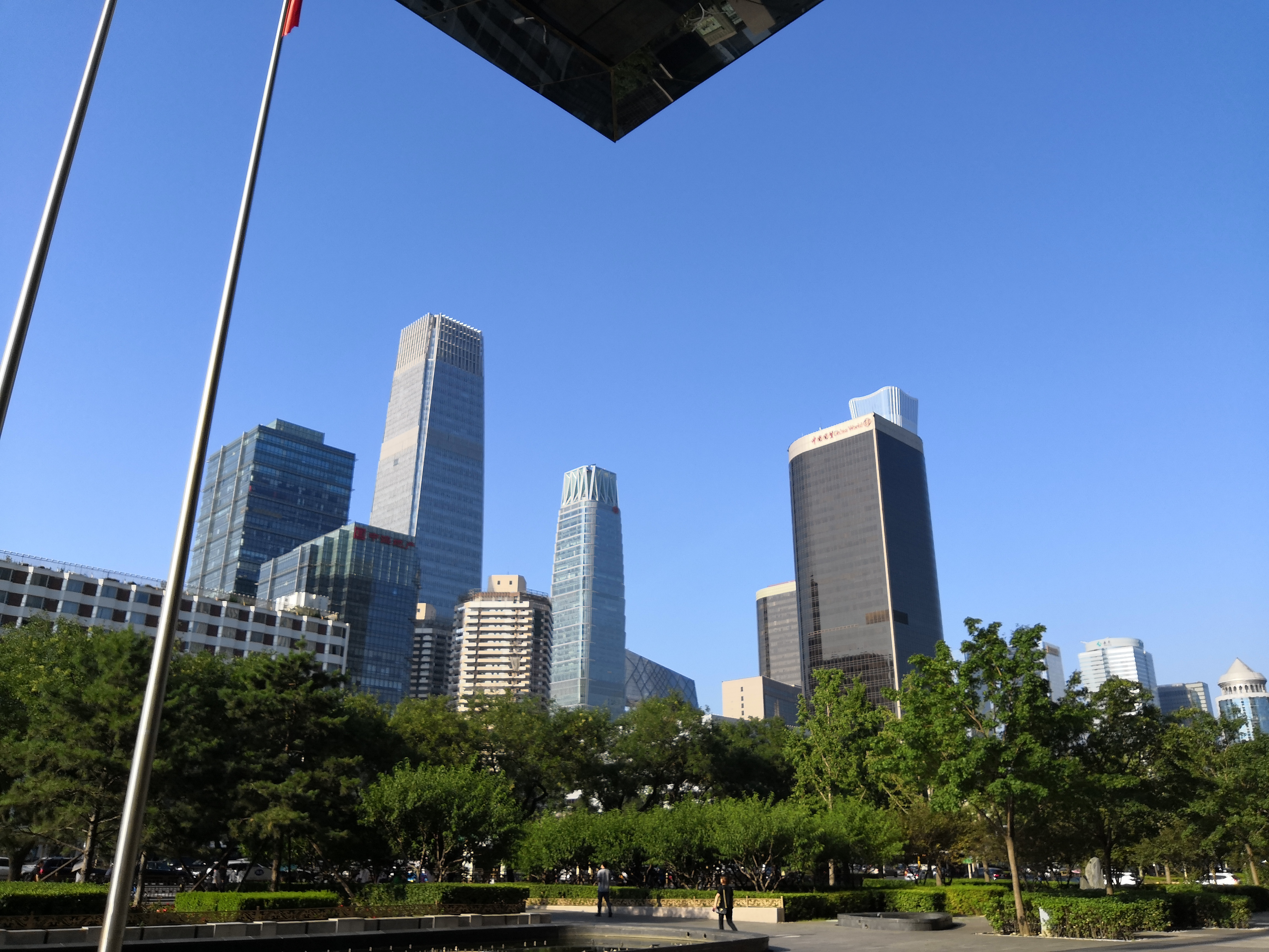 中文（中国大陆）: 从大家保险看CBD